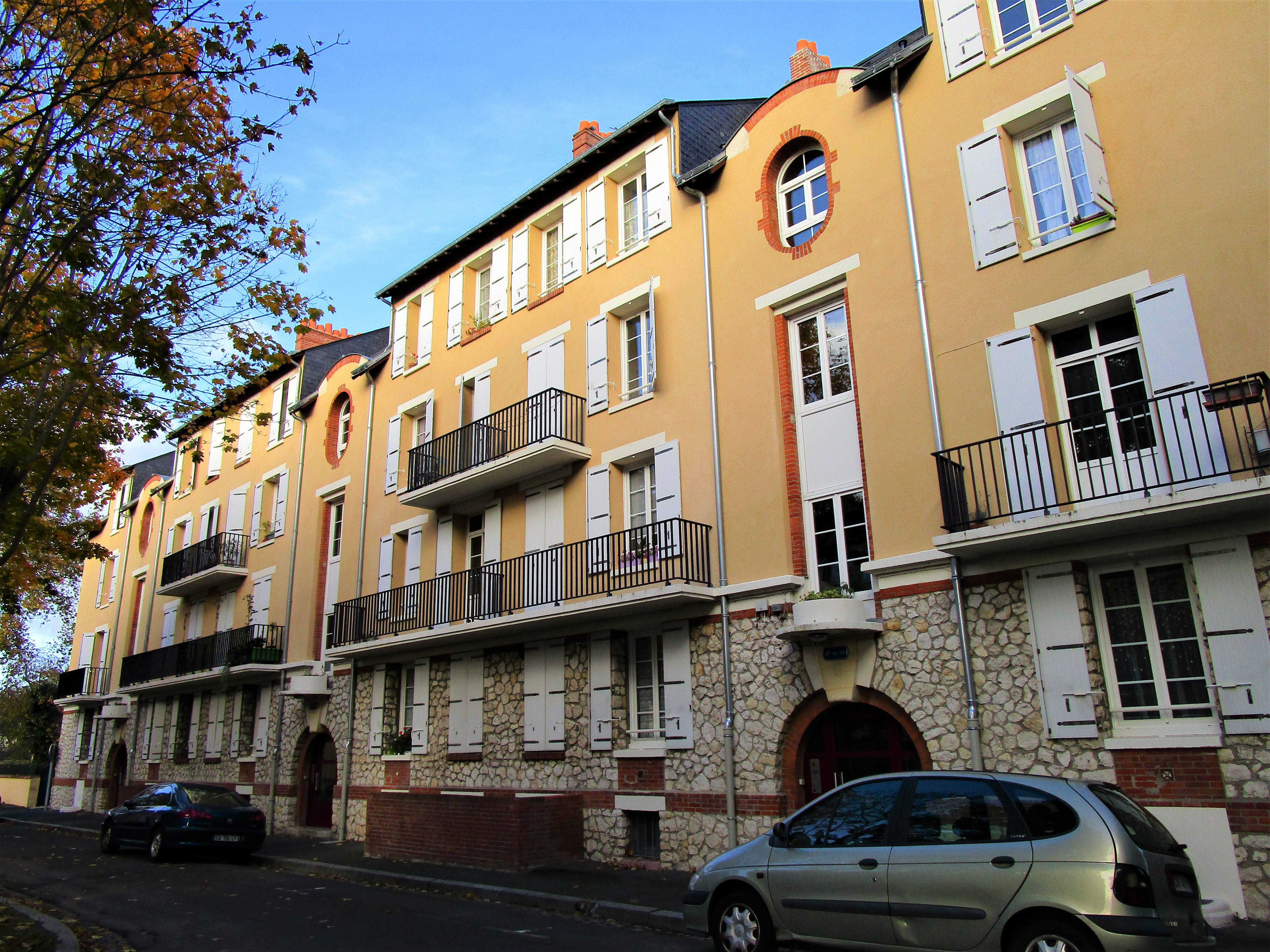 La cité-jardin Bords de Loire dans le quartier Lamartine de Tours.